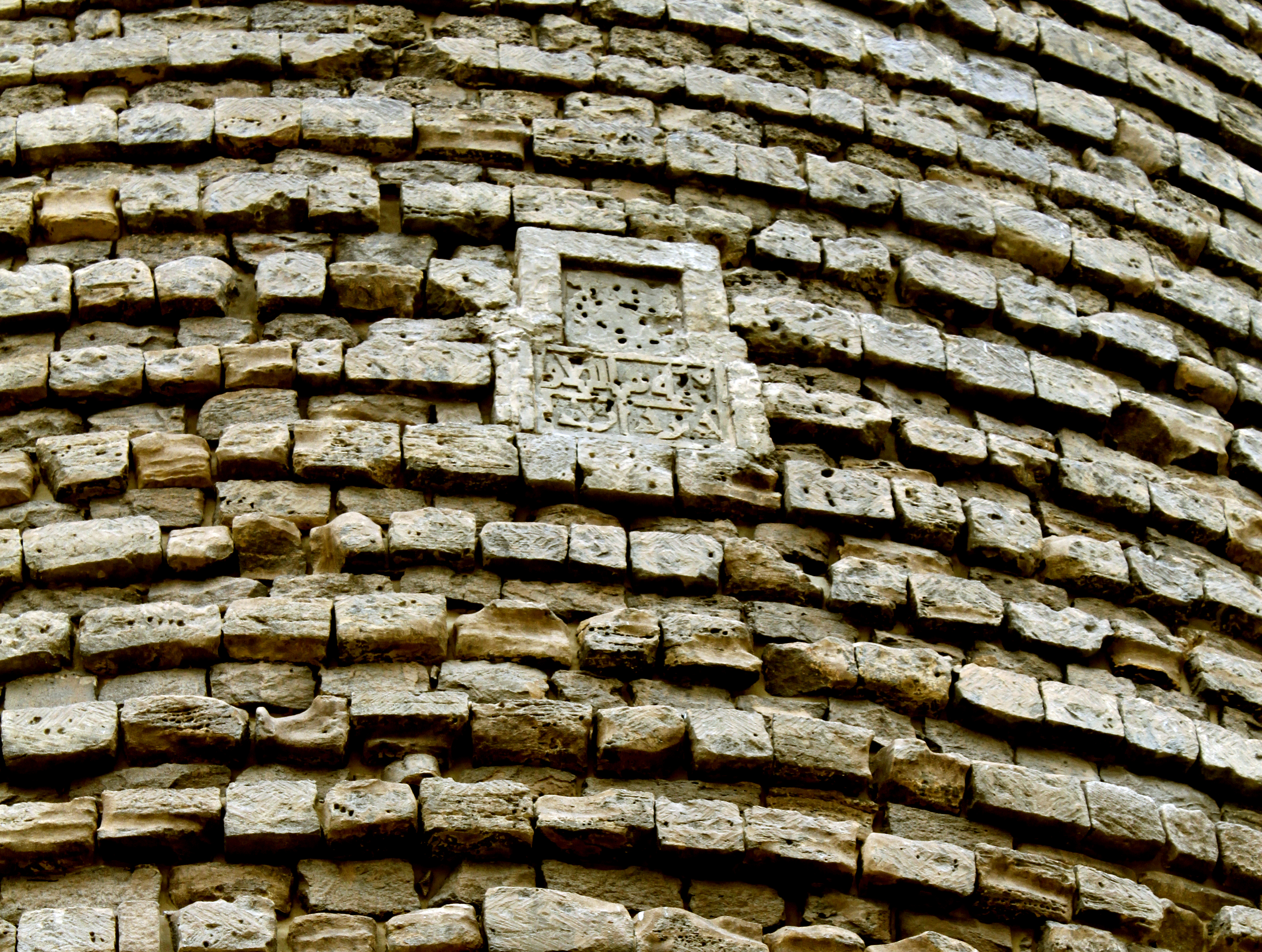 Qız qalasının kitabəsi